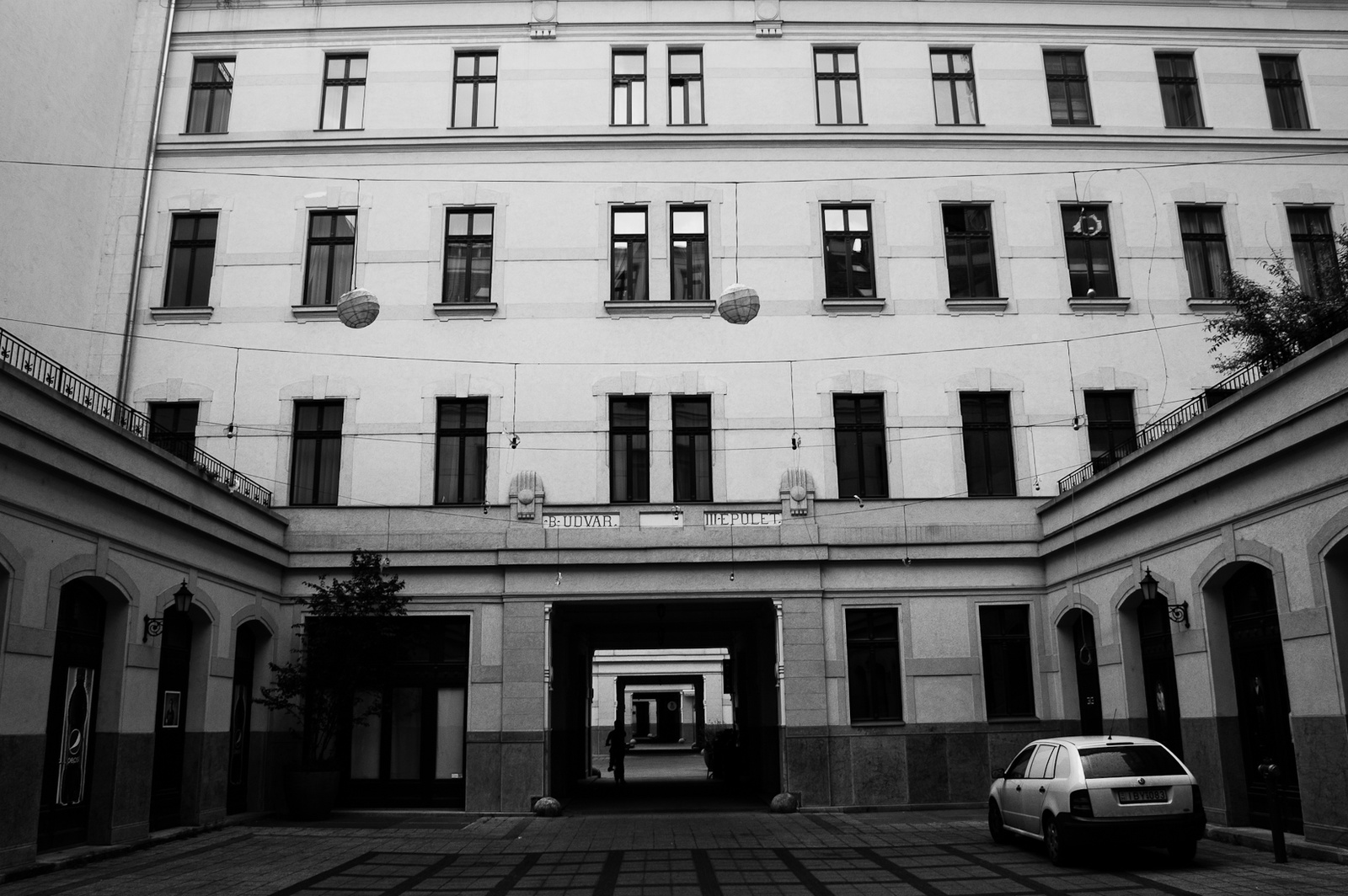 Gozsdu-udvar (Budapest 7, Király utca 13., Dob utca 16.)